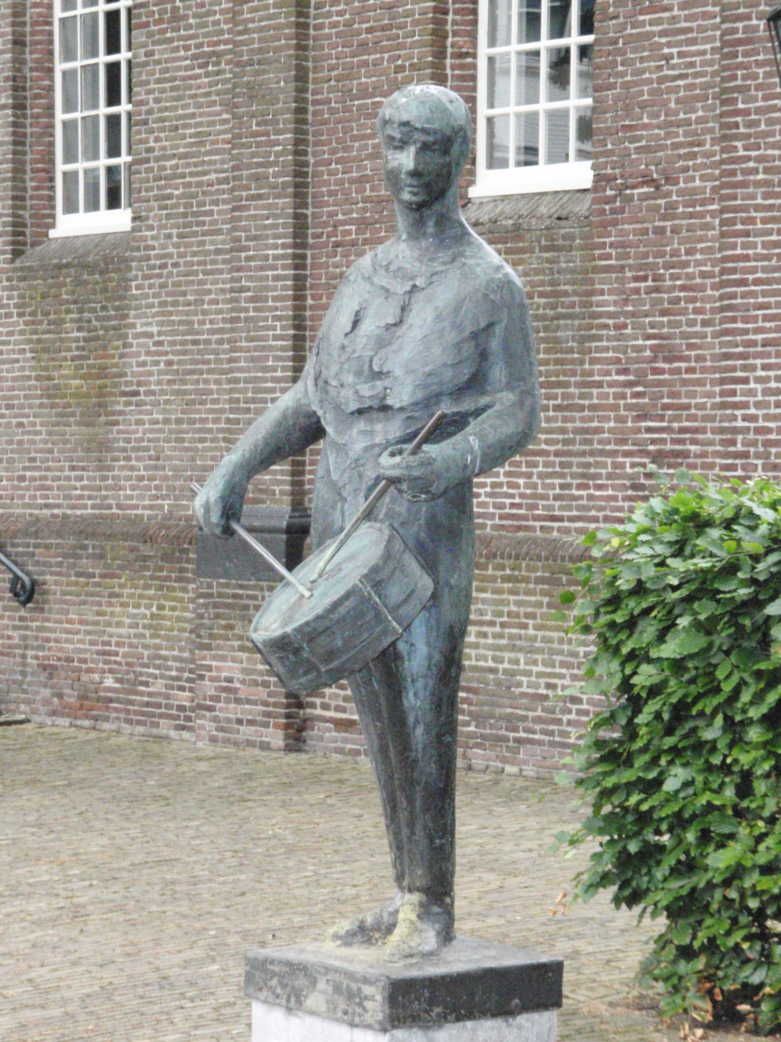 Trommelslager in Hoogeveen die oproept tot kerkgang als alternatief voor luidklokken. Gemaakt door Johan Sterenberg in 1971